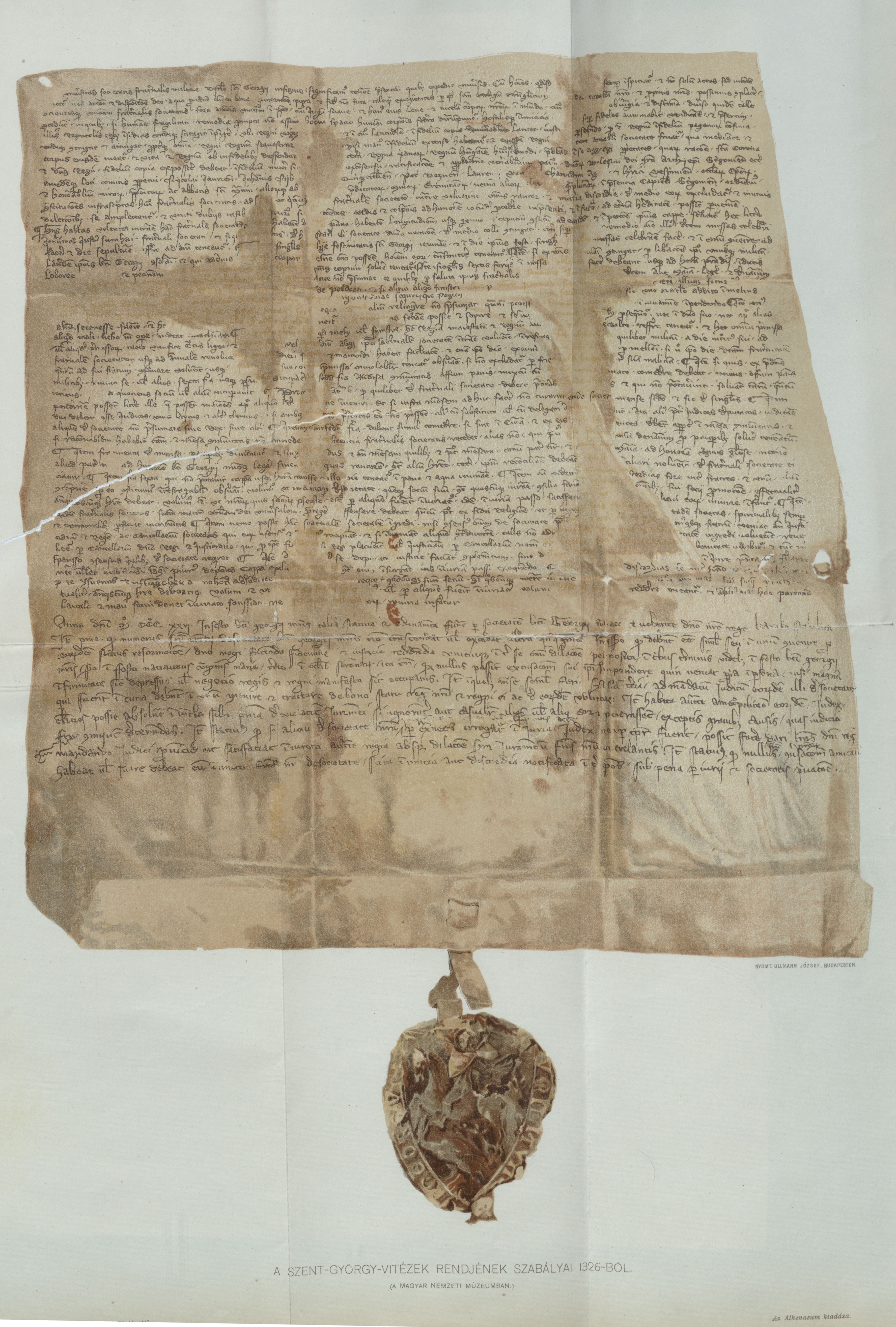 Szent György Lovagrend alapító oklevele